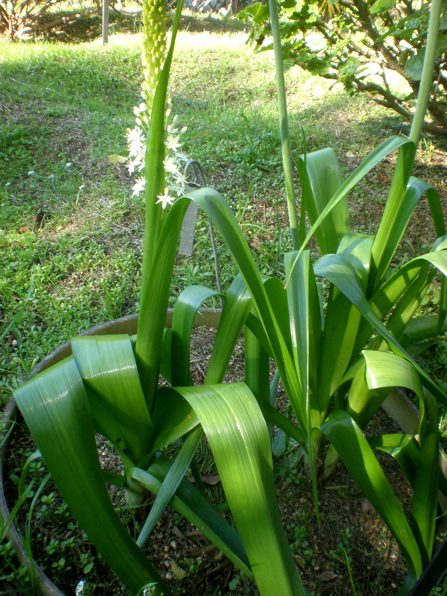 Jardín Botánico de Barcelona.